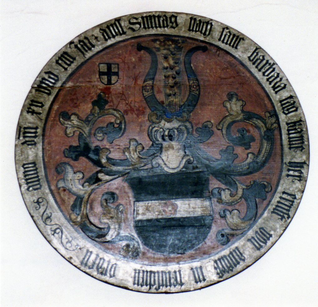 St. Jakob in Nürnberg, Aufschwörschild des Deutschen Ordnes; Ernst von Aufseß, 1603, näheres siehe hier